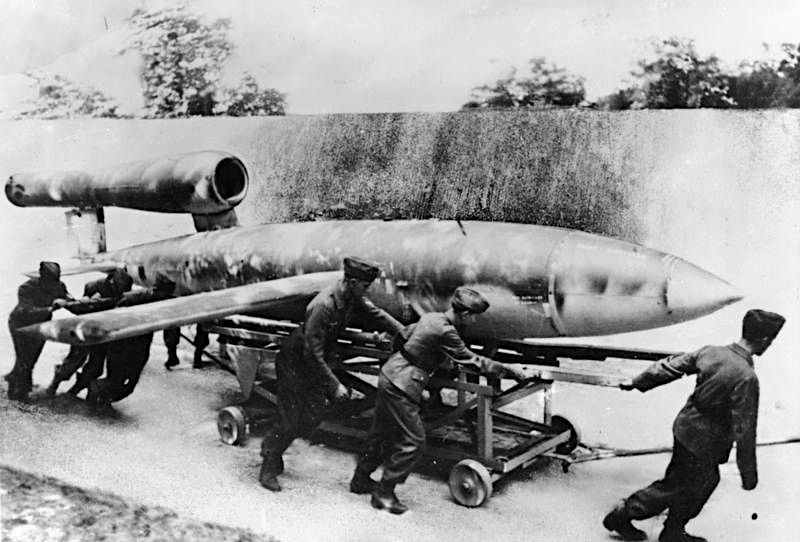 V1 vor dem Start Aus guter Deckung wird "V1" an die Abschußstelle gerollt. Der Start erfolgt durch eine Pressluftanlage. Mit Hilfe eines Fernlenkverfahrens trifft die "V1" das befohlene Ziel. Die gleichbleibend hohe Geschwindigkeit, die von keinem Feindjäger erreicht wird, erhält "V1" von einem Raketenantrieb. Diese erste deutsche Vergeltungswaffe ist eine hervorragende Schöpfung unserer Luftrüstung. Foto: PK-Lysiak/Transocean-Europapress